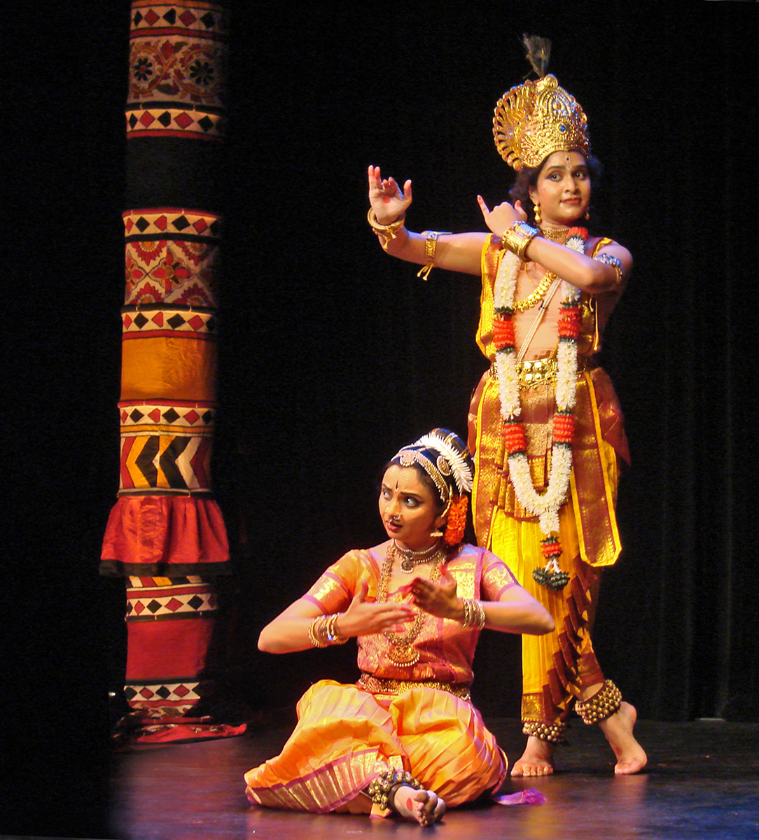 Alokaye Balakrishnam, pièce de Tarangam unique dans le répertoire du Kuchipudi (composition Raga Malika et Adi Talam; chorégraphie : Kishore Mosalikanti) Spectacle de danse Kuchipudi, organisé par le service de l'auditorium du musée Guimet en coproduction avec Triveni, présenté le samedi 19 avril 2008, dans l'auditorium du musée Guimet à Paris par : "Deepika Reddy et ses musiciens" Deepika Reddy (devant sur la photo) et Mihira Pathuri, une de ses danseuses, jouant le dieu Krishna, appartenant à Deepanjali, l'institution qu'elle a fondée en Inde et qui est dédiée à l’excellence de la pratique du Kuchipudi. Krishna - Kṛṣṇa, कृष्ण, aussi appelé Yadav, est une divinité importante de l'hindouisme